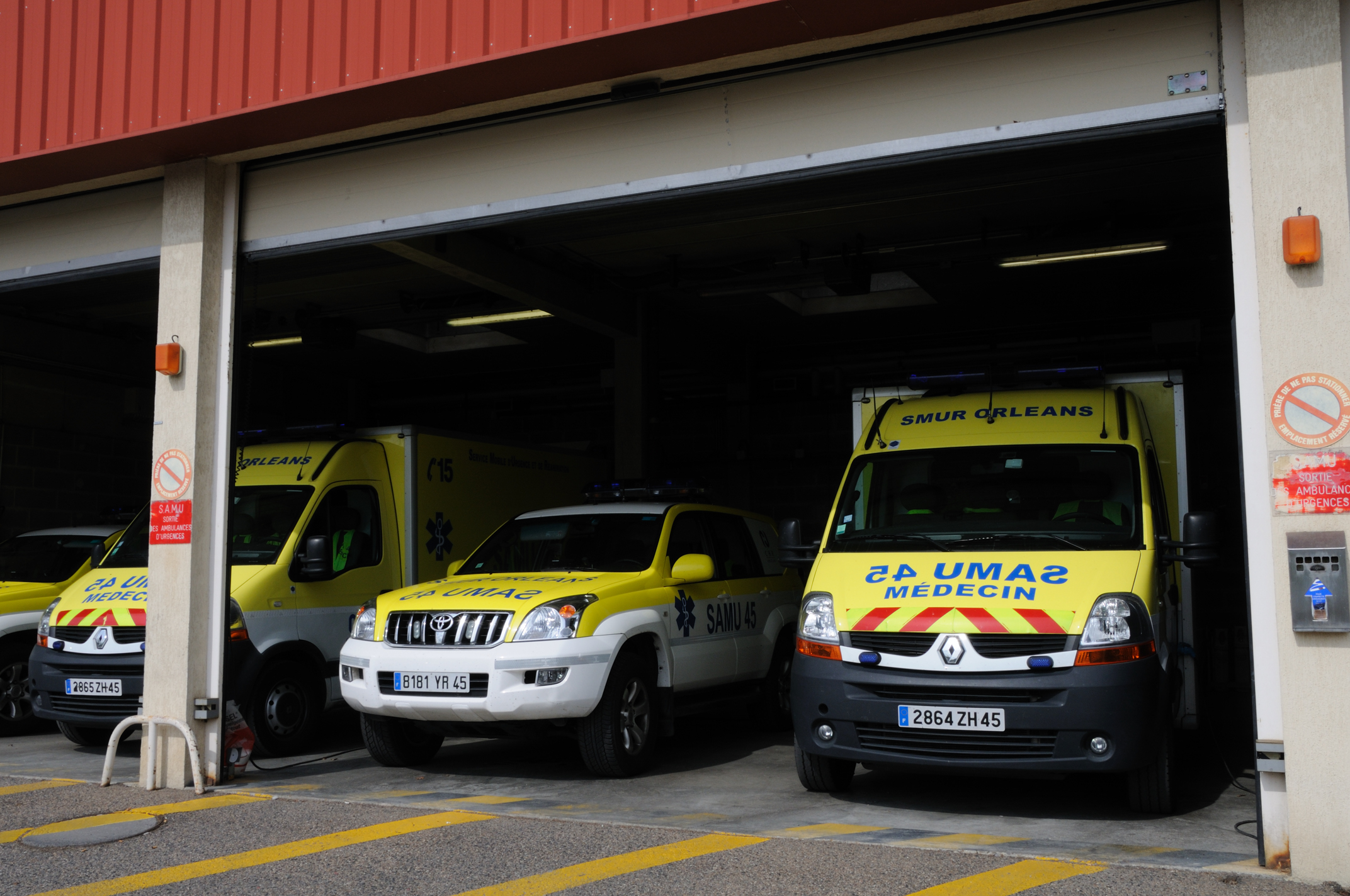 Véhicules du SAMU, Hôpital d'Orléans-la-Source, Loiret, France